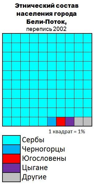 Этнический состав населения города Бели-Поток (2002)